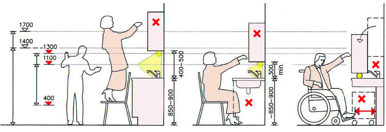 Schema von herkömmlichen Küchen